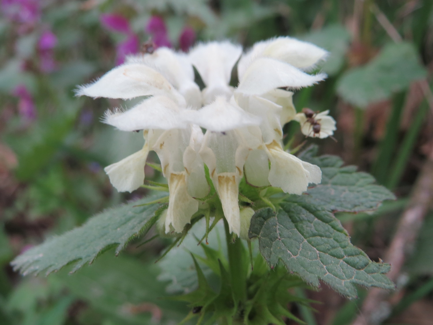 Weiße Taubnessel (Lamium album) an einer alten Römerstraße im Simbachtal, einst Jakobsweg